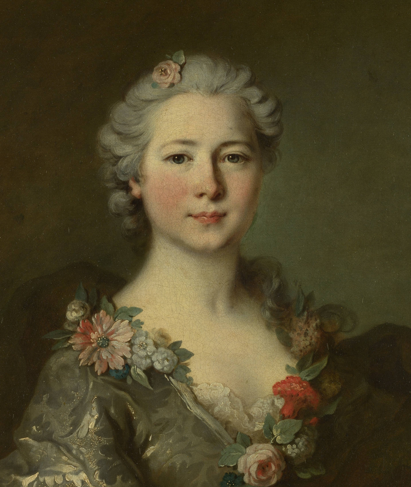 Detail